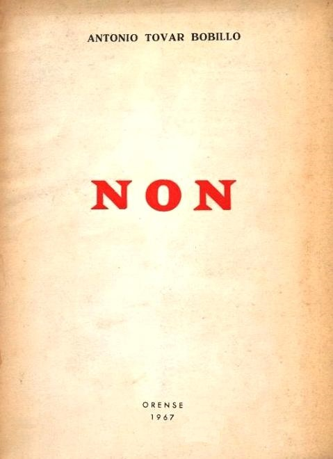 Antonio Tovar Bobillo: Non, Orense 1967